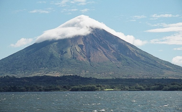 fotografia del volcan mombacho desde el lago de granada